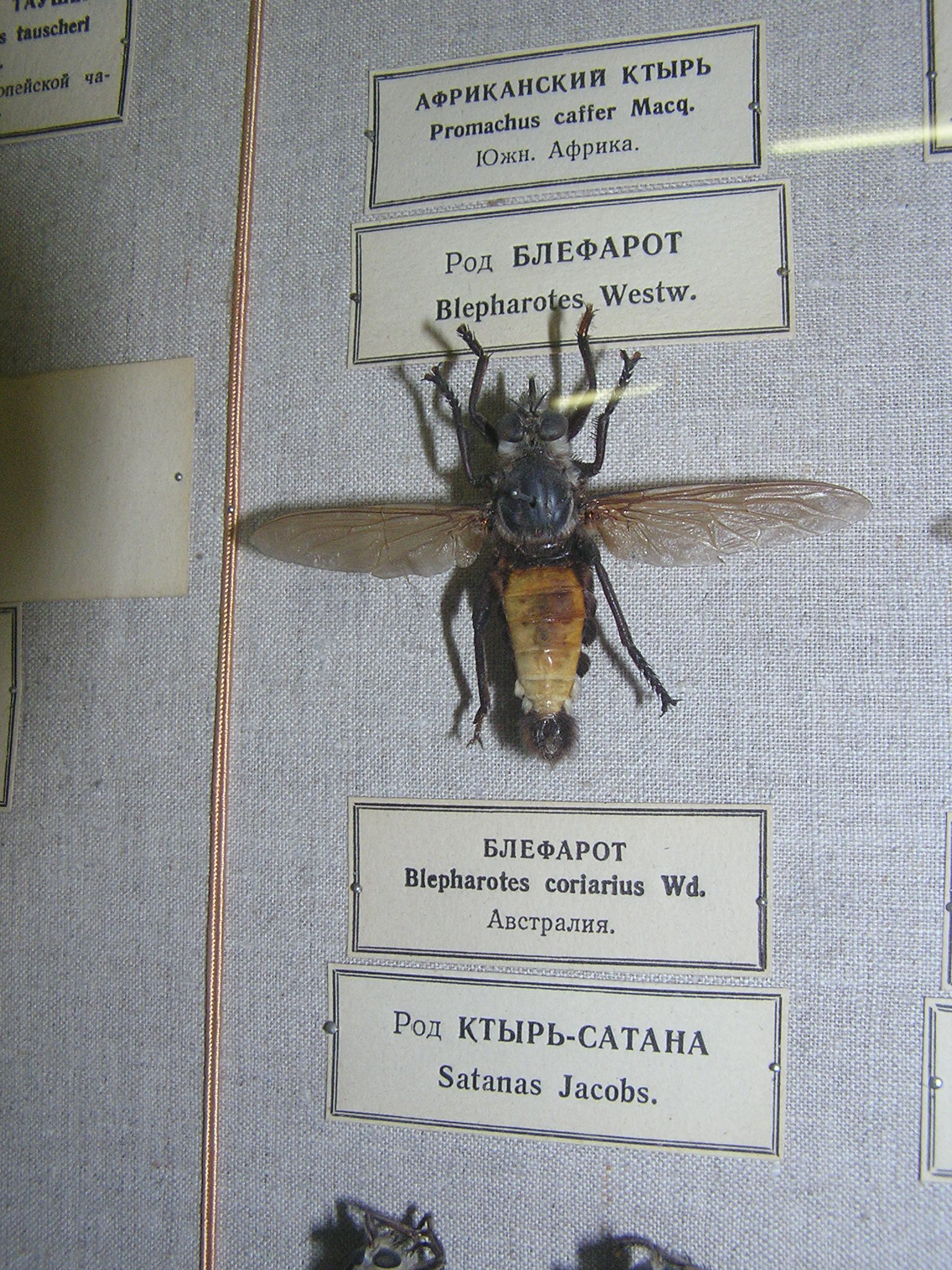 Blepharotes coriarius